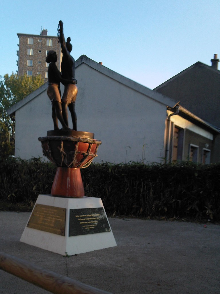 Drancy, le monument aux victimes de l'esclavage